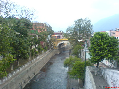 El Paseo del Río a su paso por el centro de Orizaba